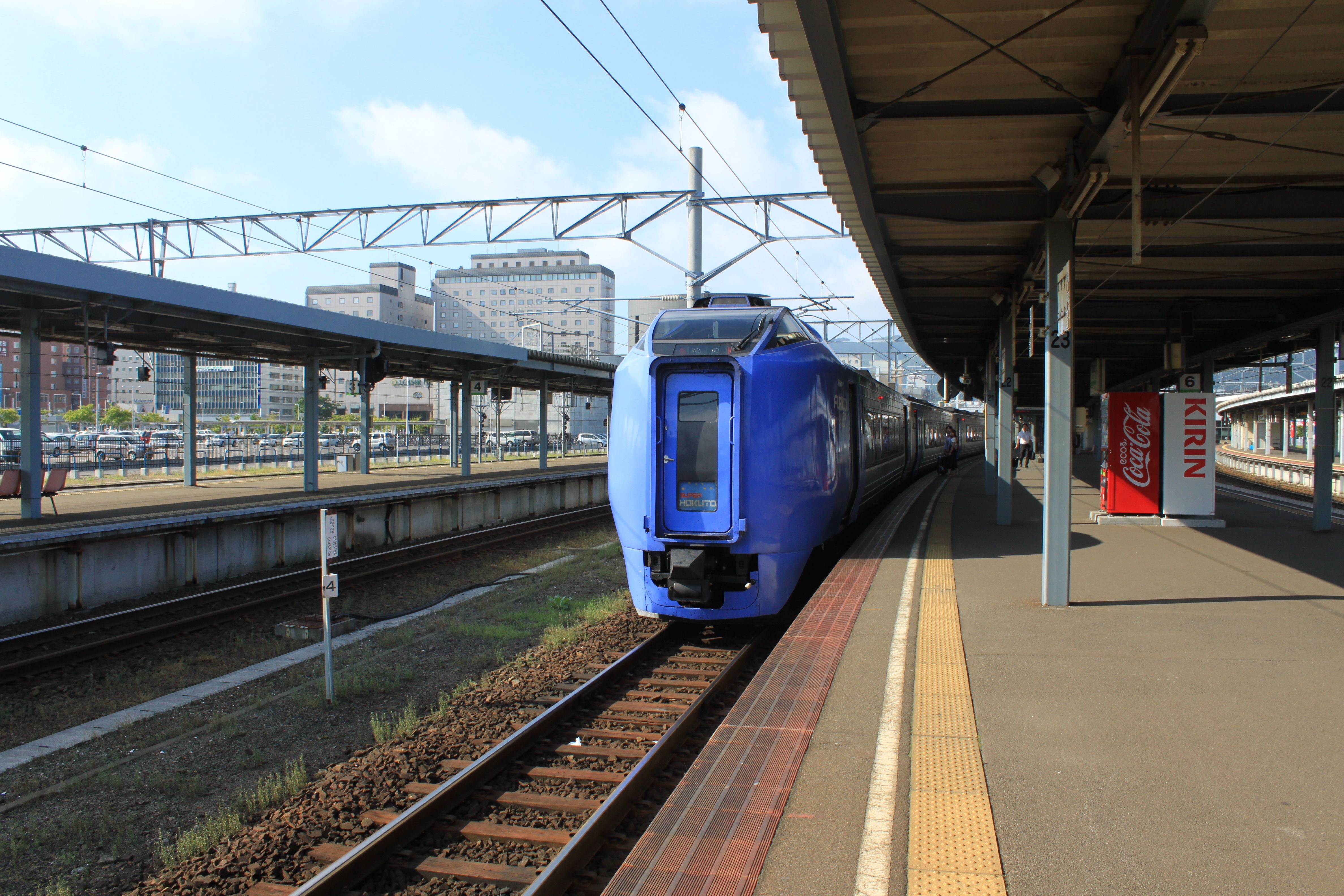 函館駅